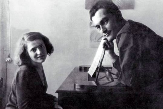 Евгений Петров и жена Ильфа за роялем. Москва, Соймоновский проезд. Фото сделано не позднее 1937 года.